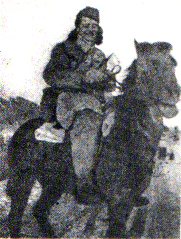 Srpskohrvatski / српскохрватски: Olga Dedijer u partizanima.